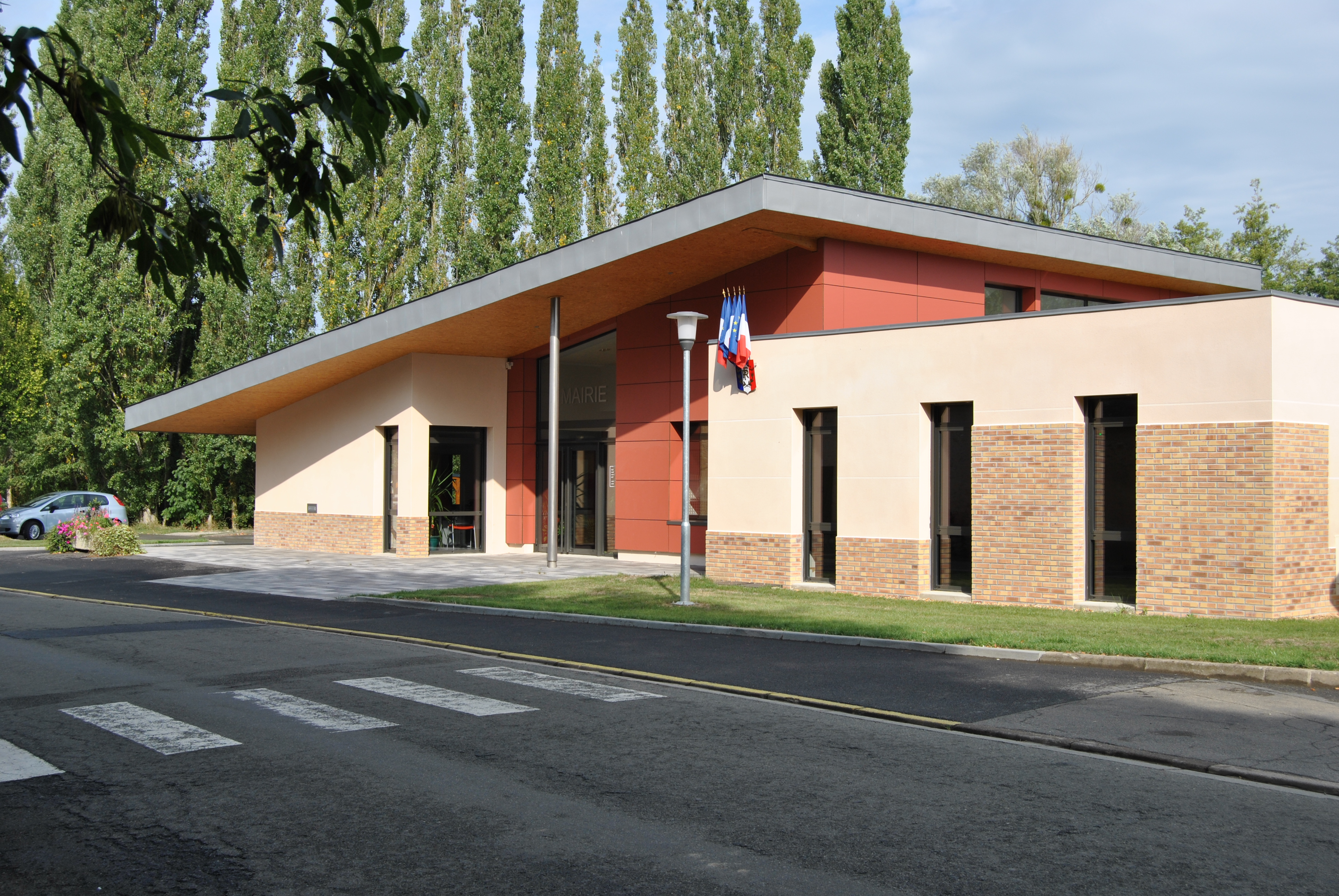 Mairie de Tennie (France, Pays de la Loire)